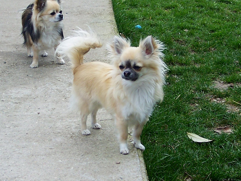 Bebop du P'tit Bocage - Etalon RECOMMANDEE (cotation 4/6) - Chihuahua Poil Long